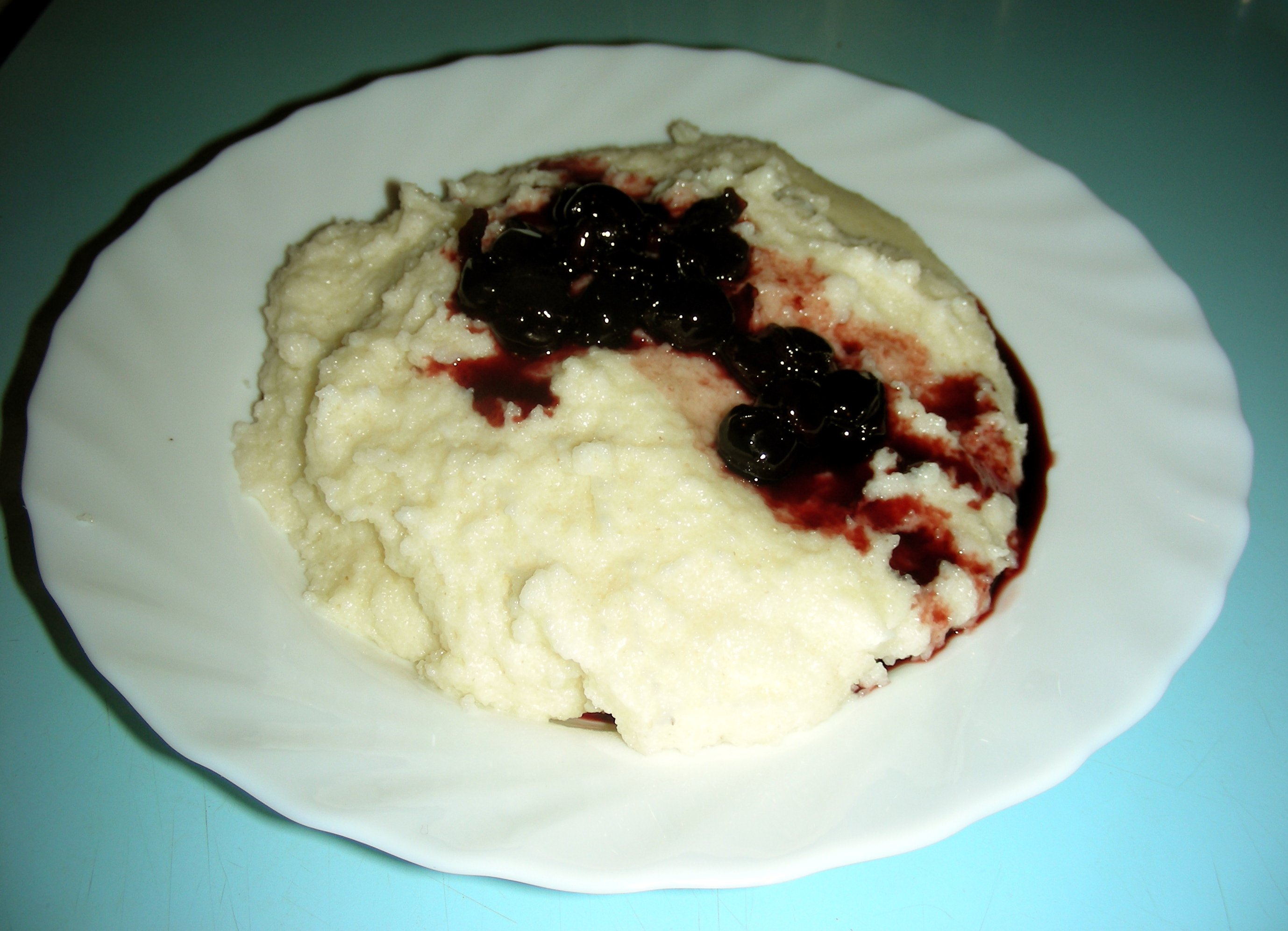 Manų košė